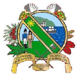 Escudo del Municipio Bolivariano de Brión en el Estado Bolivariano de Miranda; Venezuela.